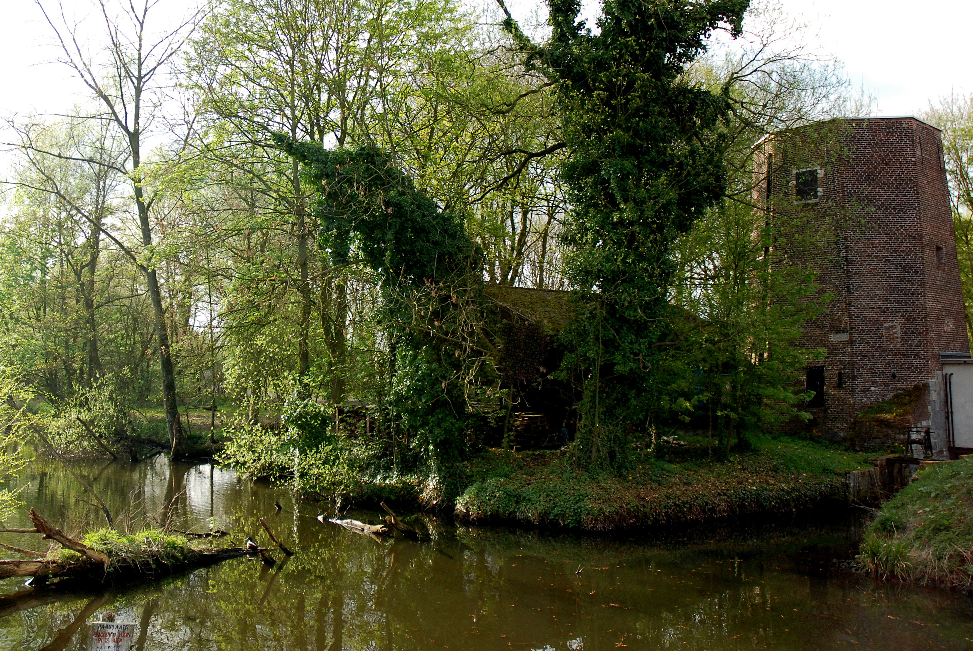 De Hoosmolen in Bourgoyen-Ossemeersen, Gent, België met links de afgesneden arm van de Leie en rechts de Grijtgracht